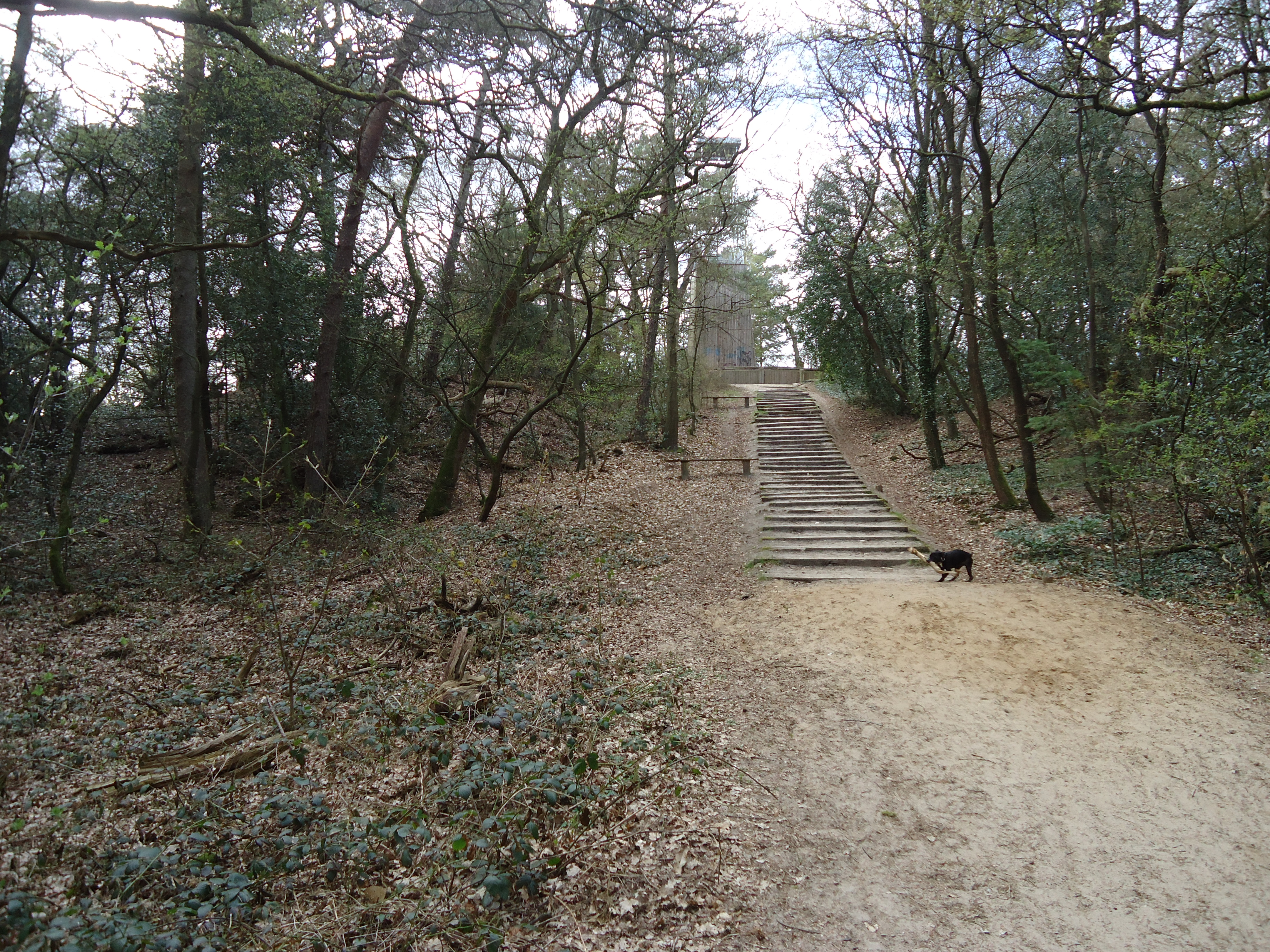 De Boskberch út it suden wei.